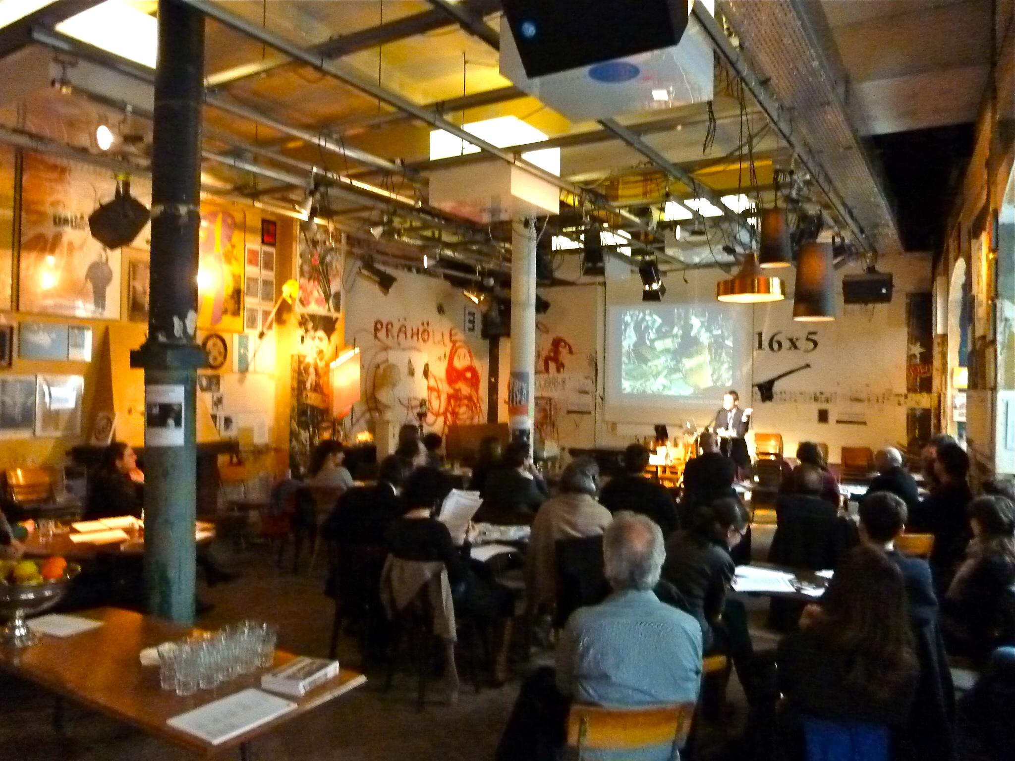 Veranstaltung im Cabaret Voltaire in Zürich